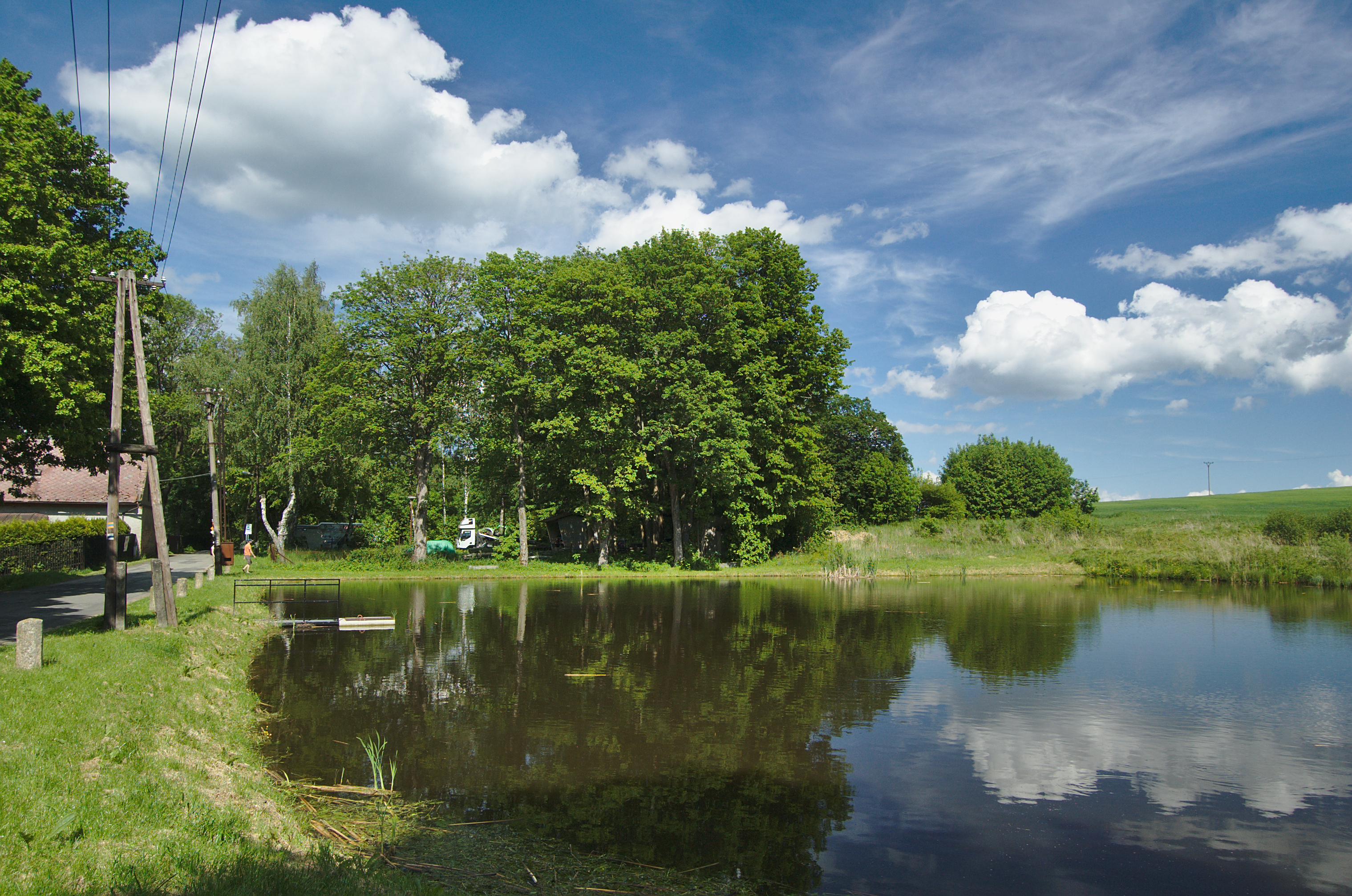 Rybník na návsi - Pavlovský dvůr, Benešov, okres Blansko